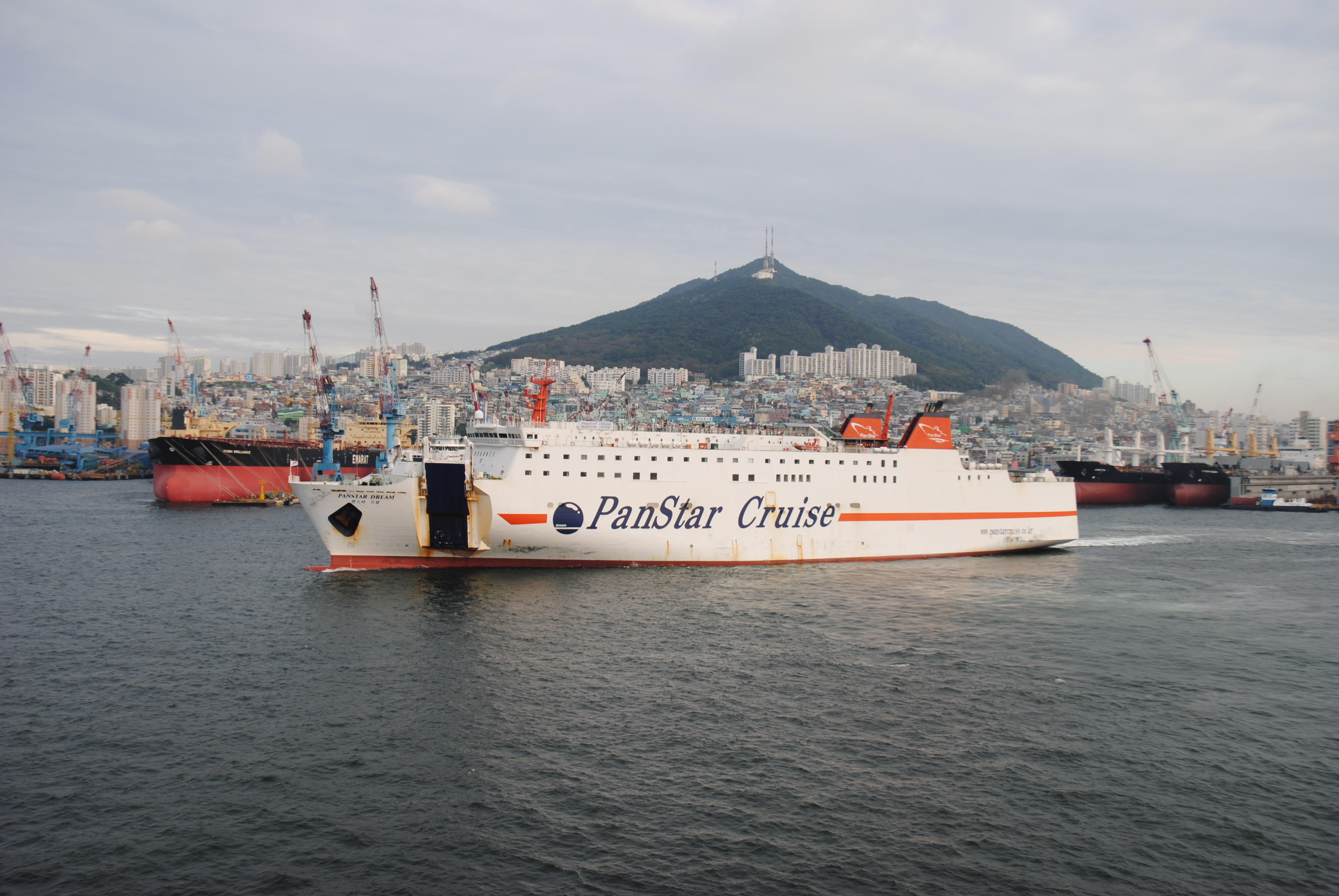 panstar cruise（パンスタークルーズ）